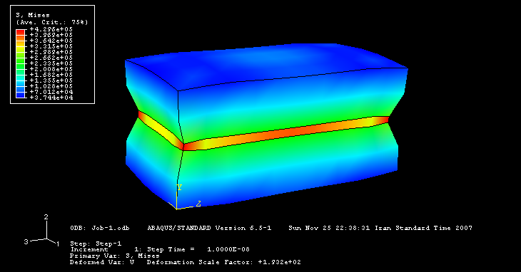 نمایش تنش حرارتی (معیار فون‌مایزز) وارده بر یک کامپوزیت ساندویچی سه لایه با اختلاف ضریب انبساط حرارتی 10E-6 /ºC در اثر سرمایش از دمای 1200ºC تا دمای اتاق. ضخامت اولیه لایه‌های بالایی و پایینی دو برابر ضخامت لایه‌ی میانی است. مقیاس تغییر شکل +193.2 در نظر گرفته شده است. تحلیل شده توسط نرم‌افزار آنالیز المان محدود ABAQUS استاندارد نسخه 6.5.1